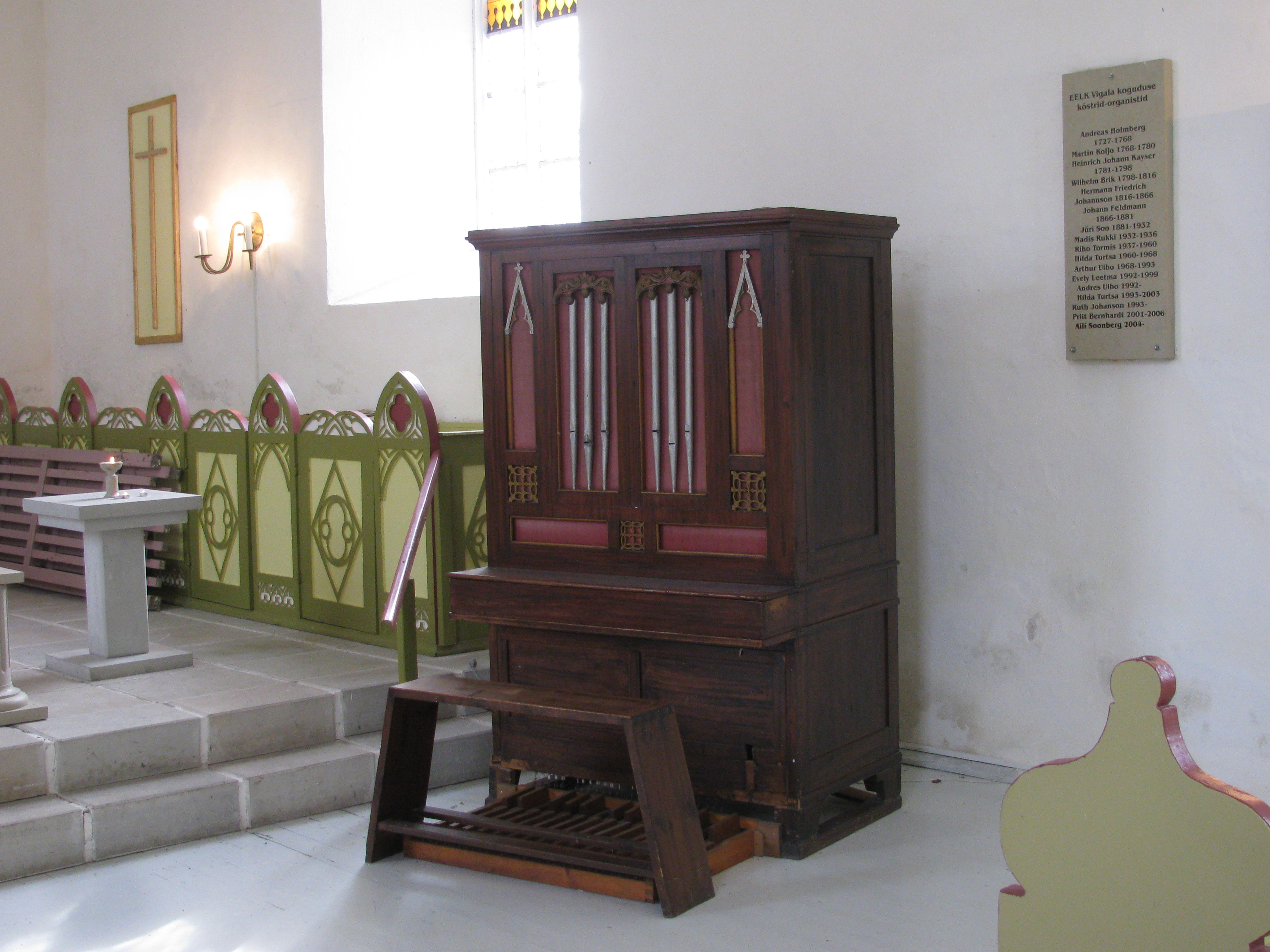 Vigala kiriku altariorel